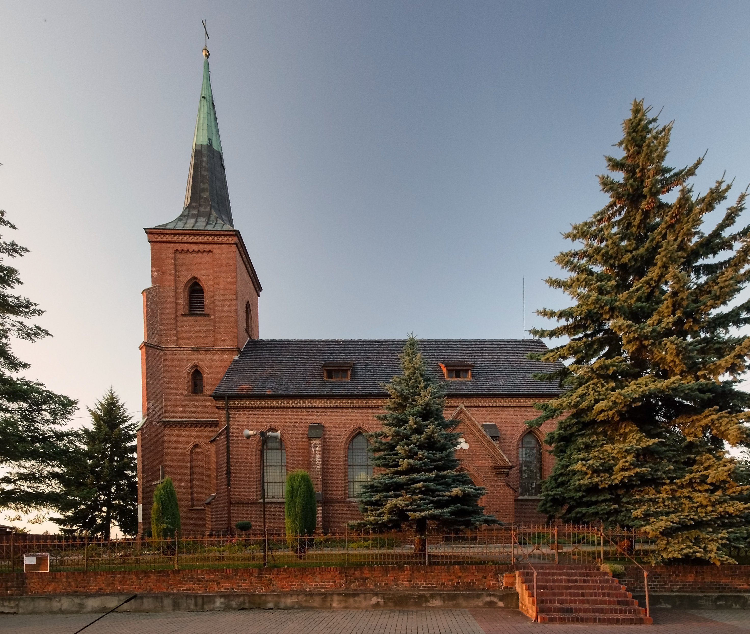 Międzybórz, kościół par. p.w. św. Józefa, 1893